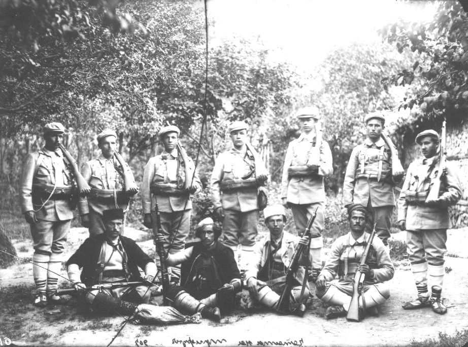 Cheta of IMRO voevoda Trifun Adzhalarski in 1907